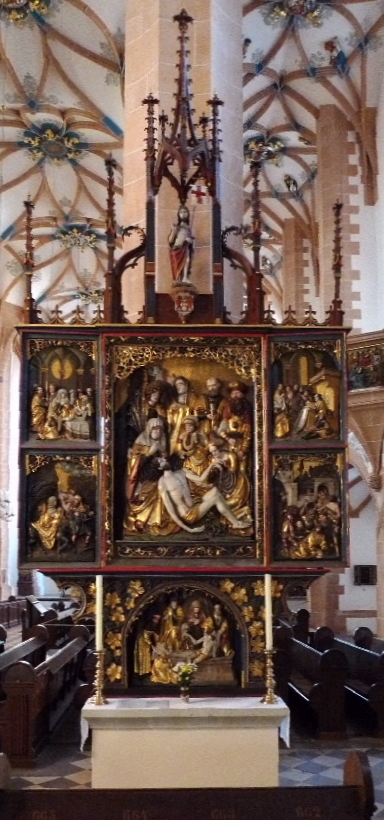 Bäckeraltar der St.-Annen-Kirche